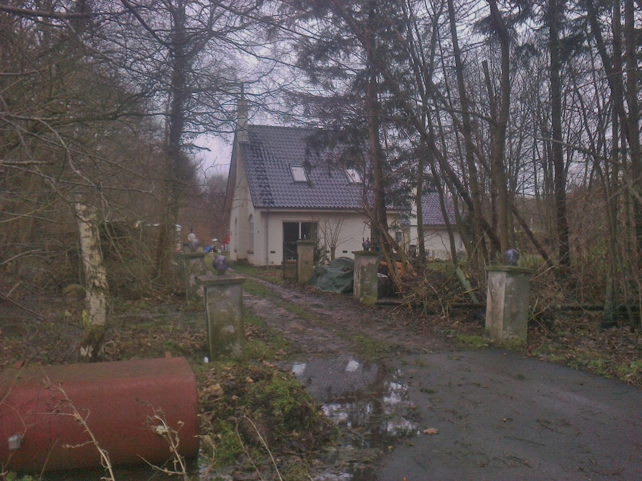 Lillering Station